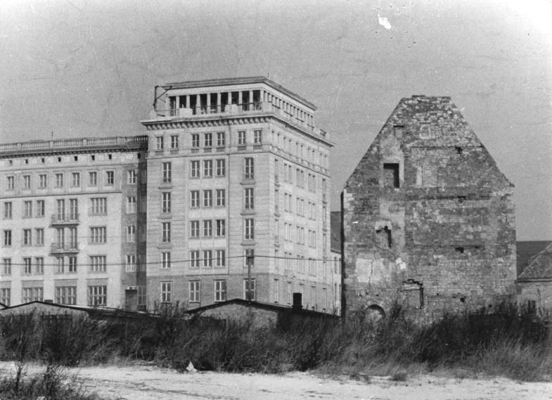 Zentralbild-Biscan Me-Qu 8 Mot. 26.2.1955 Neue Wohnungen für hunderte Magdeburger Die Arbeiten an den großen Wohnbauten der neuerstehenden Ost-West-Strasse in Magdeburg gehen trotz des Winterwetters planmässig weiter. Die meisten Wohnblöcke stehen vor der Fertigstellung, viele sind schon bewohnt. UBz, Das älteste und das jüngste Magdeburg nebeneinander, vorn die unter Denkmalschutz stehenden Reste eines der ältesten Häuser Magdeburgs, im Hintergrund neue Wohnblöcke im östlichen Abschnitt der Strasse.